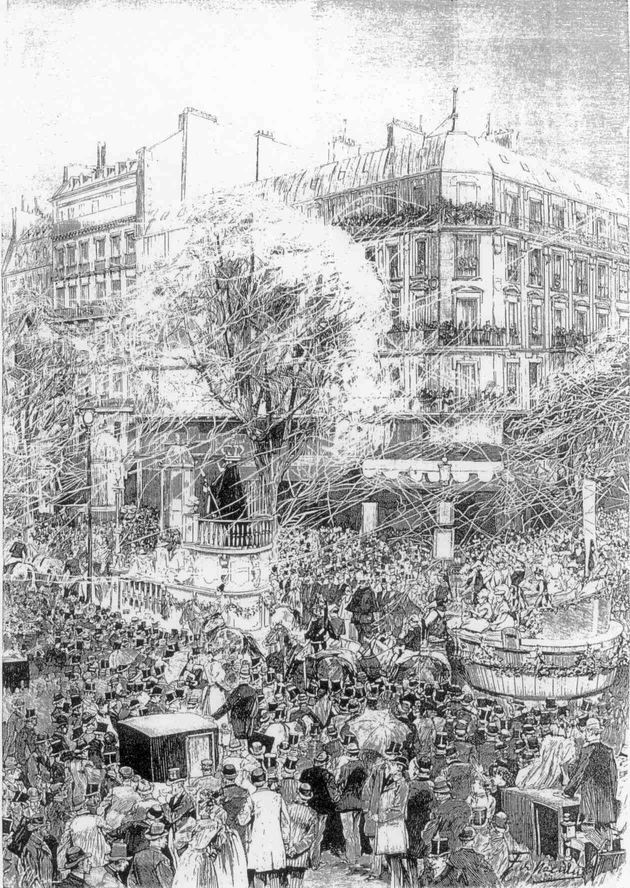 Le défilé de la Mi-Carême 1893 à Paris.